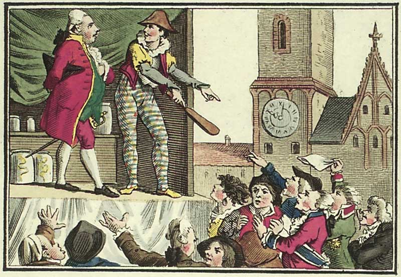 "der quaksalber und sein narr" Kupferstich ; koloriert ; 46 x 66 mm. In: Neues Abeze- und Lesebuch : mit vielen schönen Bildern / Campe, Joachim Heinrich. - Braunschweig, 18XX. - (Sämmtliche Kinder- und Jugendschriften. 1 / Campe, Joachim Heinrich). - Bd. 1. - S. 156/157